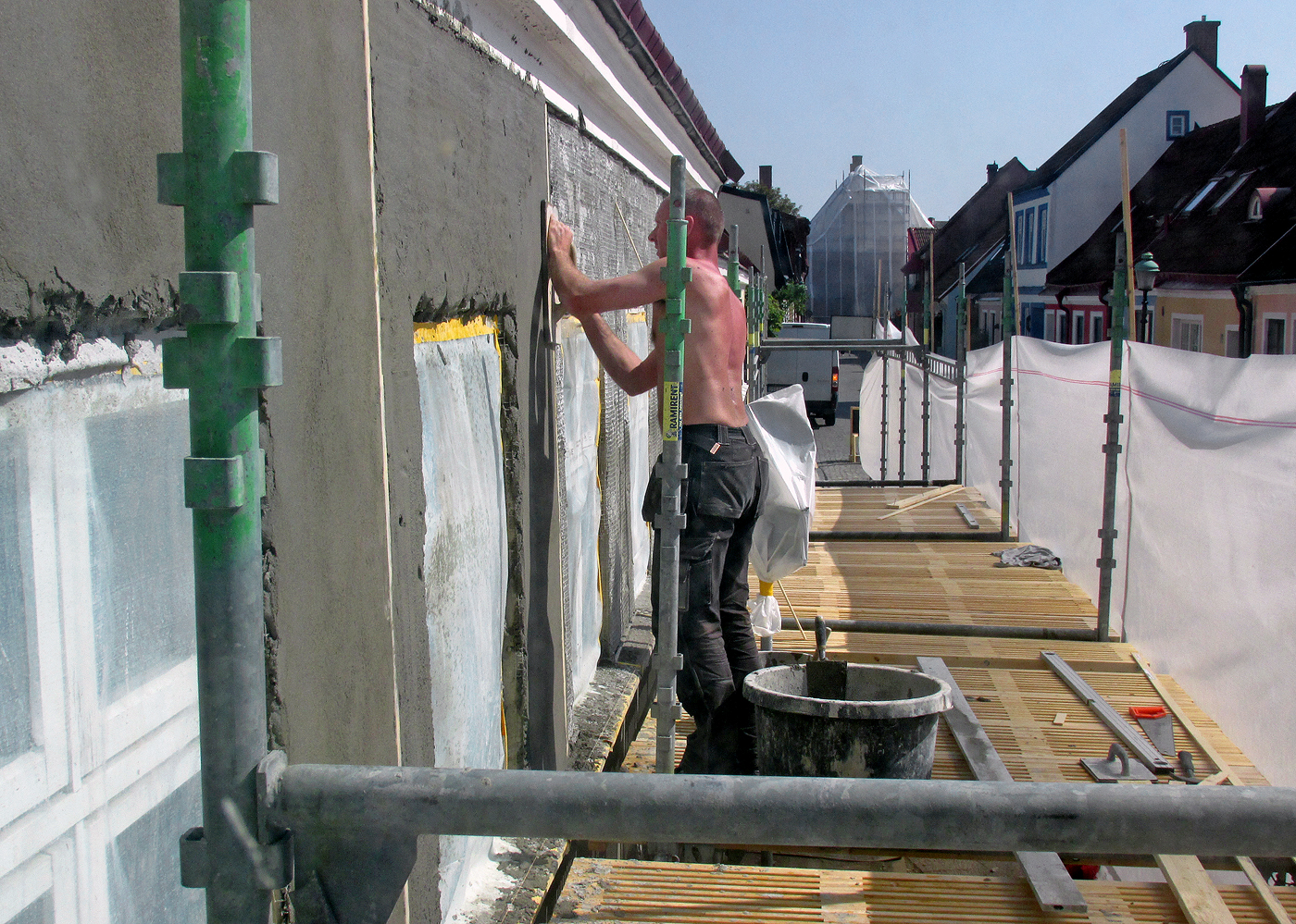 En Murare putsar en vägg på en fastighet i Ystad, 23 maj 2014.